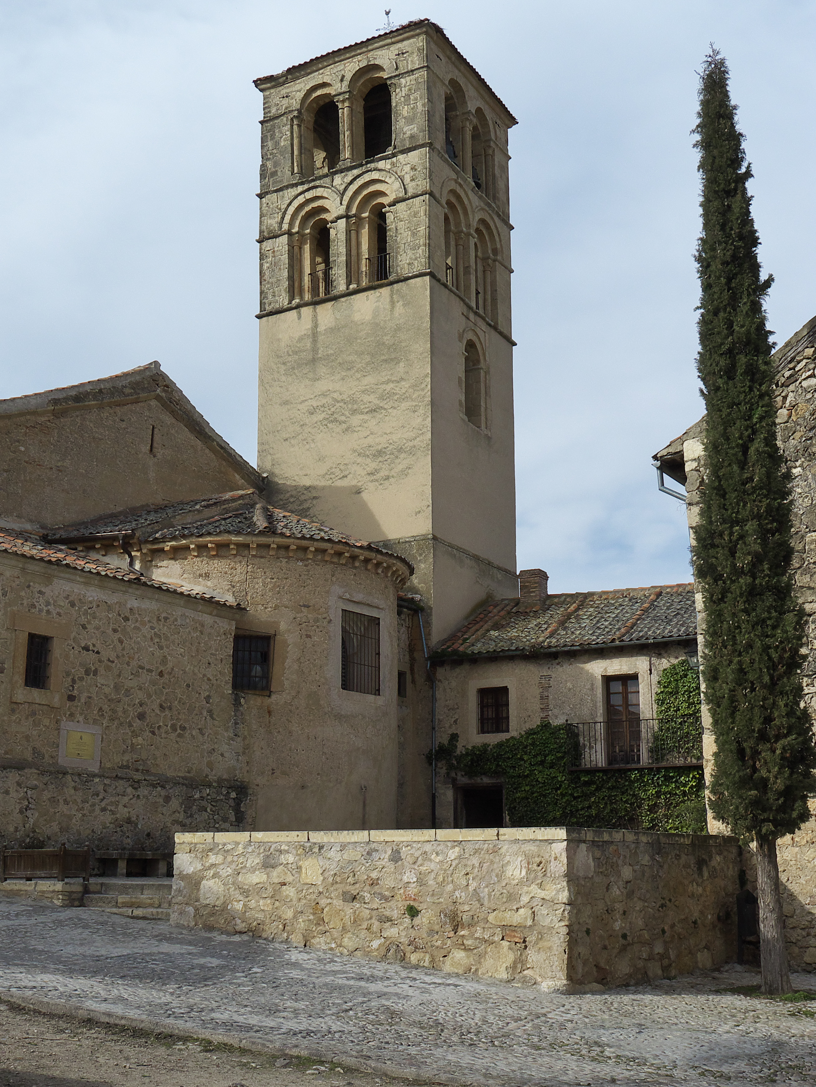 Testigo del origen románico de la iglesia